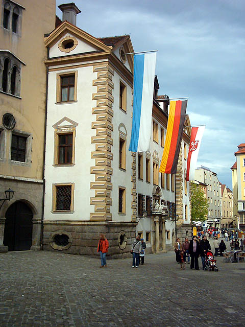 24. April 2005: Altes Rathaus Regensburg, Ehrenbeflaggung anlässlich der Amtseinführung von Papst Benedikt XVI. Im Hintergrund der Kohlenmarkt Bildautor: wolpertinger Rathaus zu Regensburg